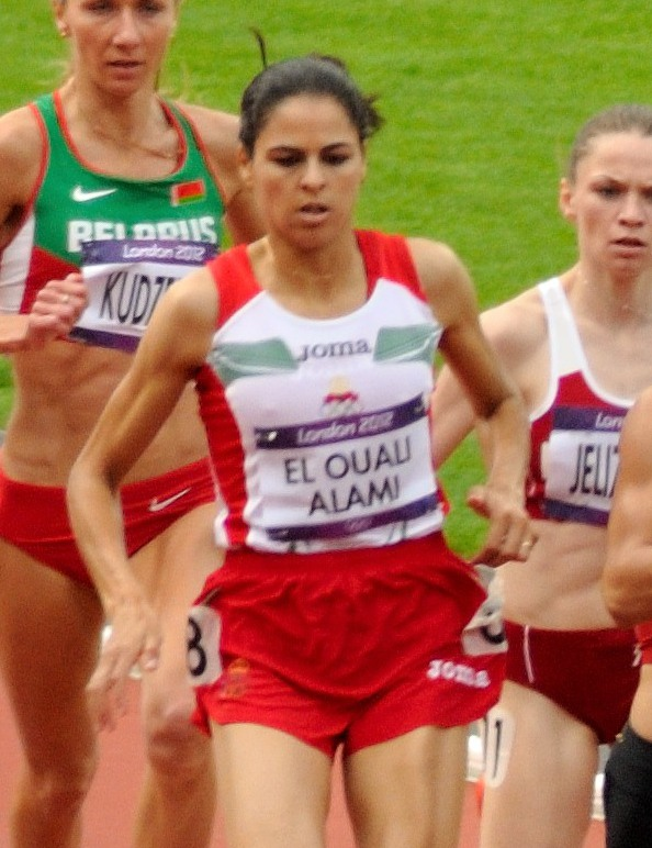 London 2012 Womens 3000m Steeplechase, Salima El Ouali Alami